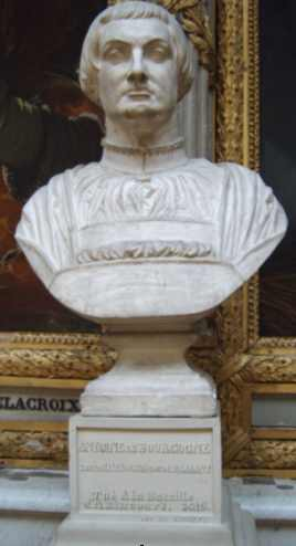 Buste de la galerie des batailles du château de Versailles. Bernard Dominique.